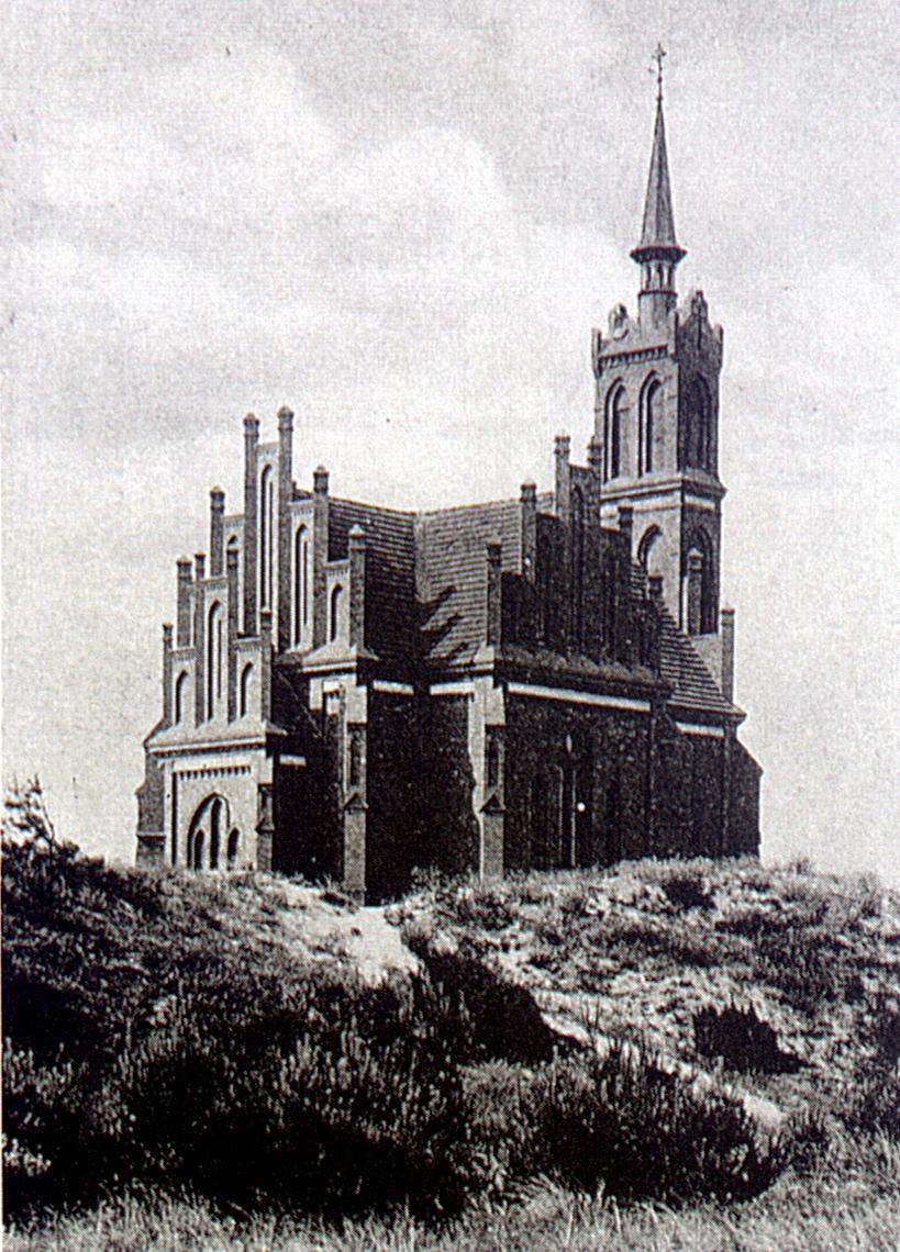 Dziwnów - nieistniejący kościół ewangelicki. Zniszczony w 1945 podczas działań wojennych